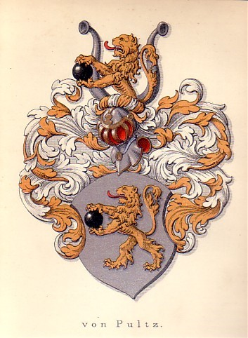 Slægten von Pultz våbenskjold